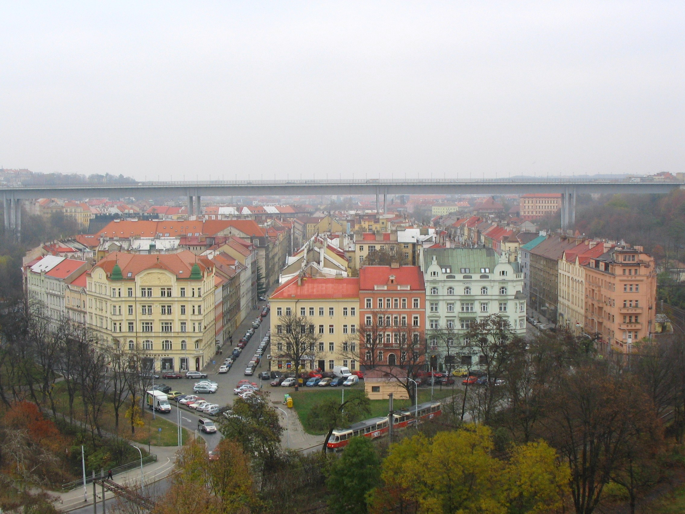 Česky: Praha-Nusle: Ostrčilovo náměstí, Nuselské údolí a Nuselský most z hradeb Vyšehradu